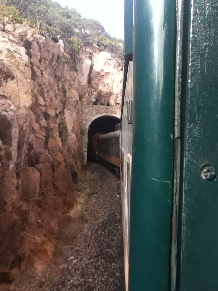 Tunel desde el Chepe.